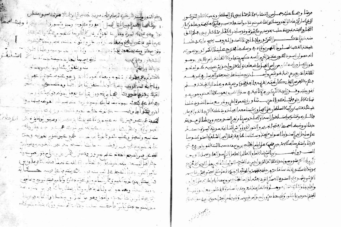 Relato das viagens de Ibn Battuta escrito por Ibn Juzayy. Parte do manuscrito está na Biblioteca da França